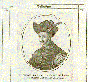 Lodovico Isolano.